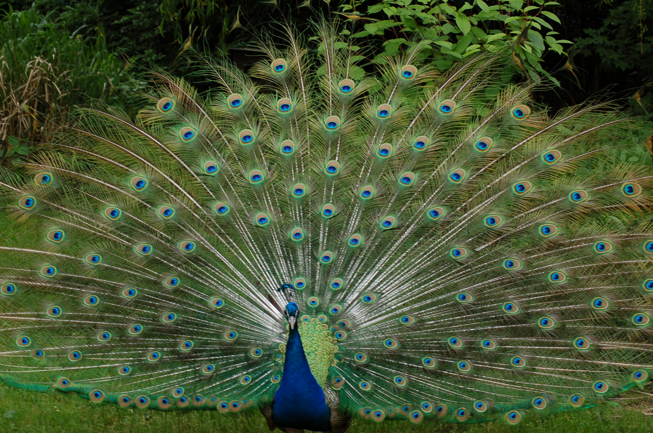 Blauer Pfau schlägt Rad. Zoo Wingst, Niedersachsen.